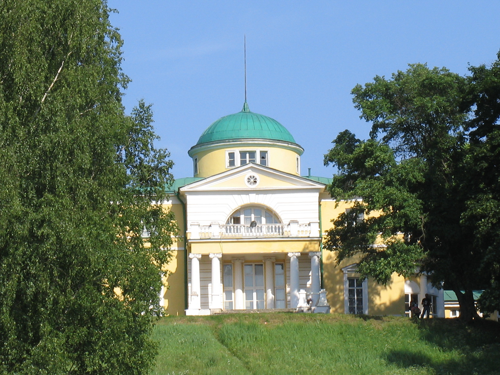 Дом усадьбы Братцево со стороны МКАД